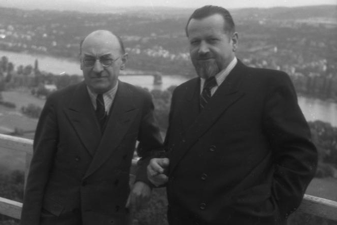 Ministerpräsidenten-Konferenz der Länder der 3 Westzonen Deutschlands auf dem Berghotel Rittersturz in Koblenz (v.l.n.r.: Leo Wohleb, Dr. Hanns Haberer) 8.-10.7.1948